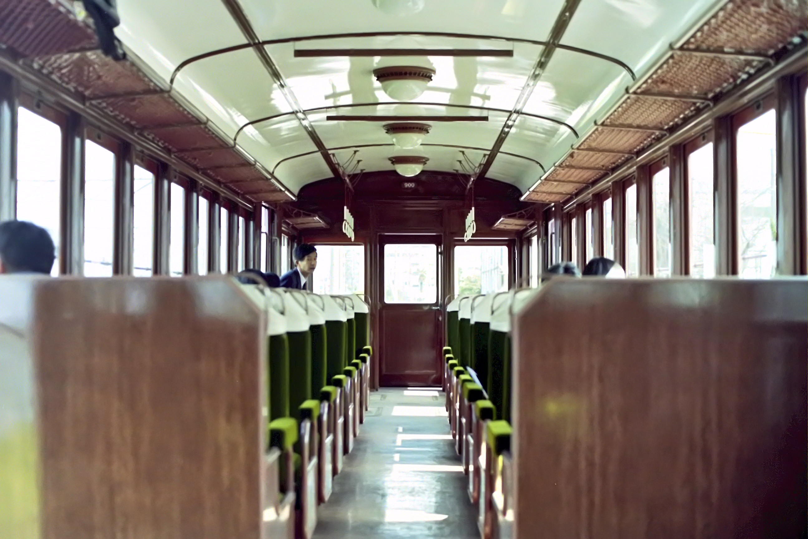 阪急900形保存車車内